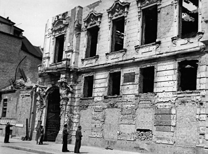 Berlin, Behrenstraße, Ruine Gedenkstätten berühmter Männer in Berlin. In diesem Haus in der Behrenstrasse neben der Komischen Oper lebte der Komponist Otto Nicolai. Die Inschrift der Tafel lautet: "Hier wohnte in seiner letzten Lebenszeit Otto Nicolai, königlicher Hofkapellmeister, geb.9.6.1810, gest. 11.5.1849 Die Stadt Berlin 1919" Aufn.: Illus Richter 1 Leu. 7208-50 13.7.50 Information added by Wikimedia users. Behrenstraße 57. Die Inschrift der Tafel lautet: "Hier wohnte in seiner letzten Lebenszeit / Otto Nicolai / königlicher Hofkapellmeister / * 9.6.1810 † 11.5.1849 / Die Stadt Berlin 1910" (O. Mönch, Die Gedenktafeln in Berlin, 1911), sie soll 1947 entfernt worden sein